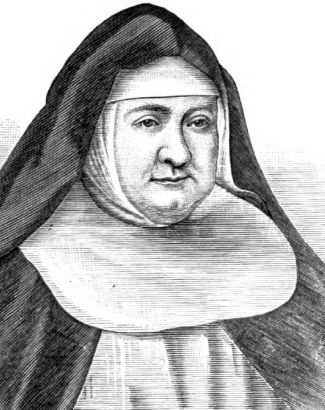 Margaret Hallahan, dite Mère Marguerite de la Mère de Dieu (1803-1868).